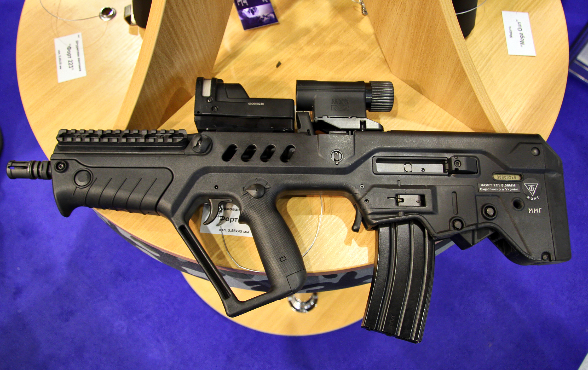 Форт 221 (Fort 221)